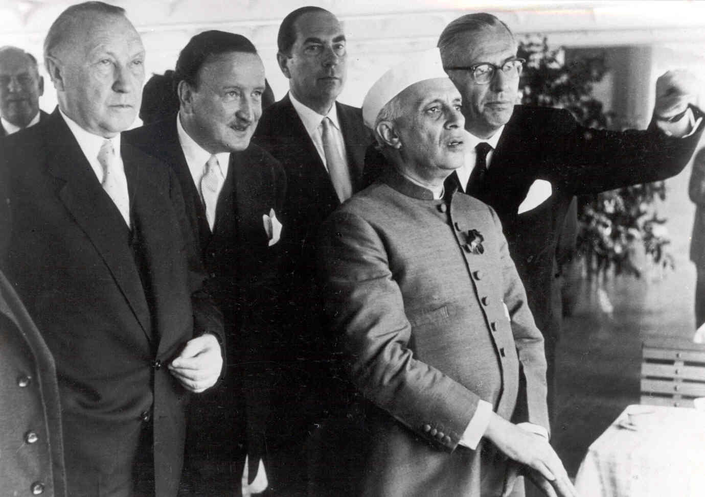 Hermann Josef Abs mit Konrad Adenauer beim Staatsbesuch des indischen Ministerpräsidenten Jawaharlal Nehru 1956. (3.v.l.: Ernst Hellmut Vits)